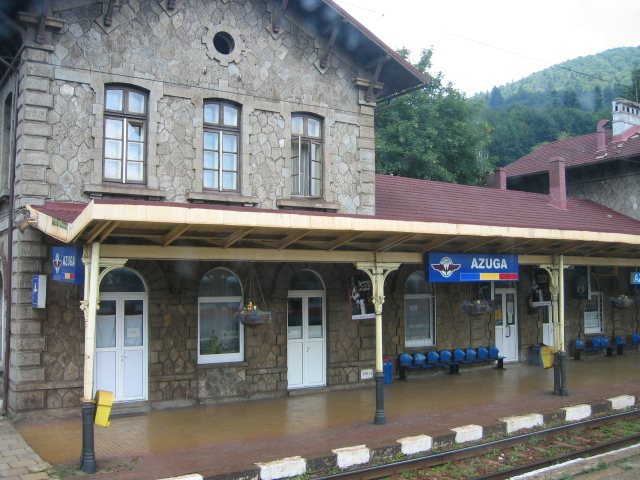 Azuga Gara